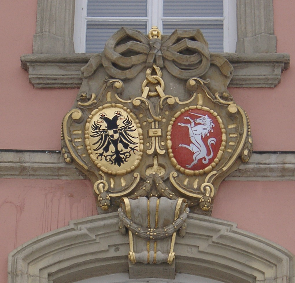 Doppelwappen am Rathaus (Reichswappen und Stadtwappen mit dem Einhorn)